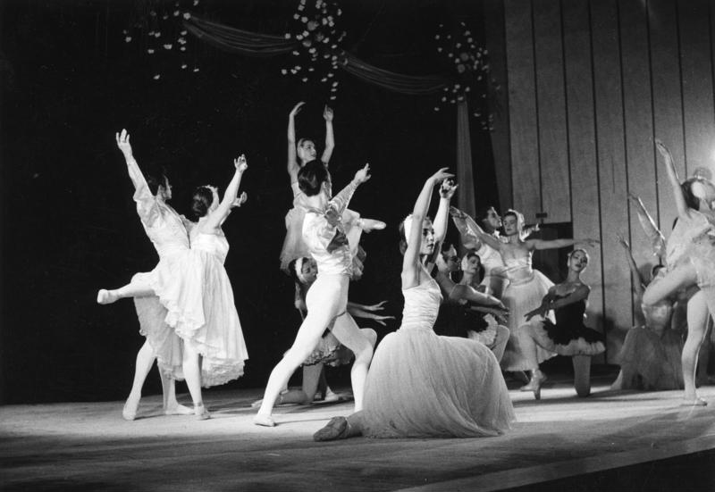 Tanzvorführung der Städt. Oper Berlin in der Stadthalle Bad Godesberg zu Ehren des Staatspräsidenten von Liberia